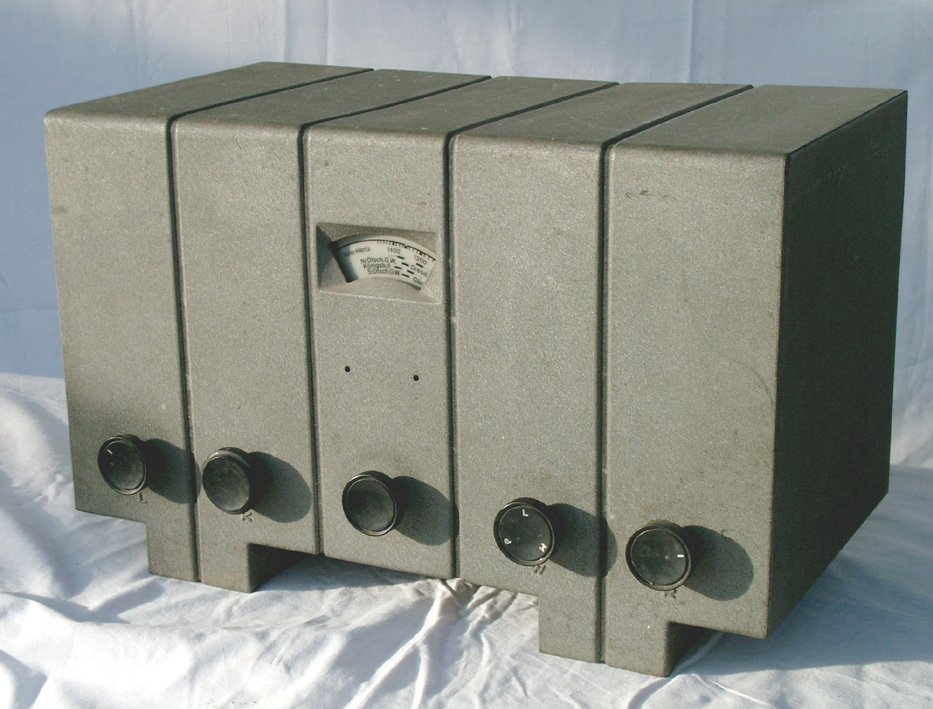 Deutscher Arbeitsfrontempfänger DAF1011; Stassfurter Rundfunk-Gesellschaft mbH; 1935 (DAF-Emblem fehlt)